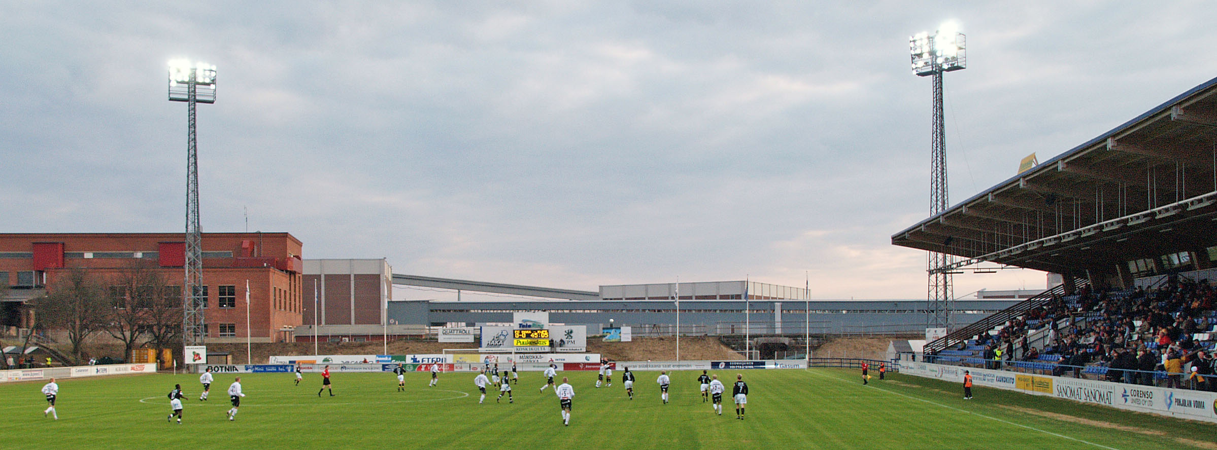 Tehtaan kenttä -football stadium in Valkeakoski, Finland. Home of FC Haka Valkeakoski (Premiership team). Own photo.